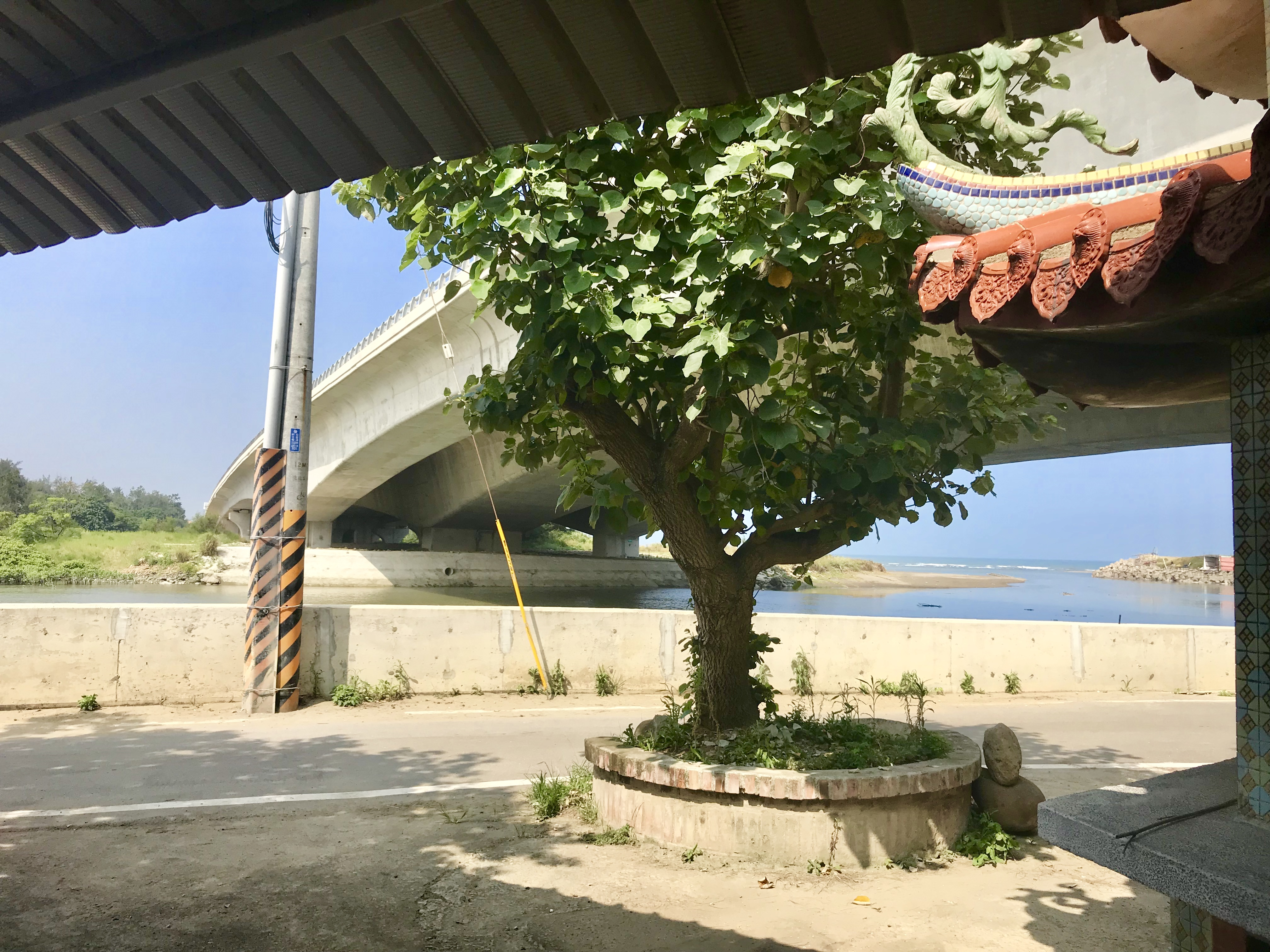 十五王公廟前的福興溪出海口與西部濱海快速公路福興溪橋